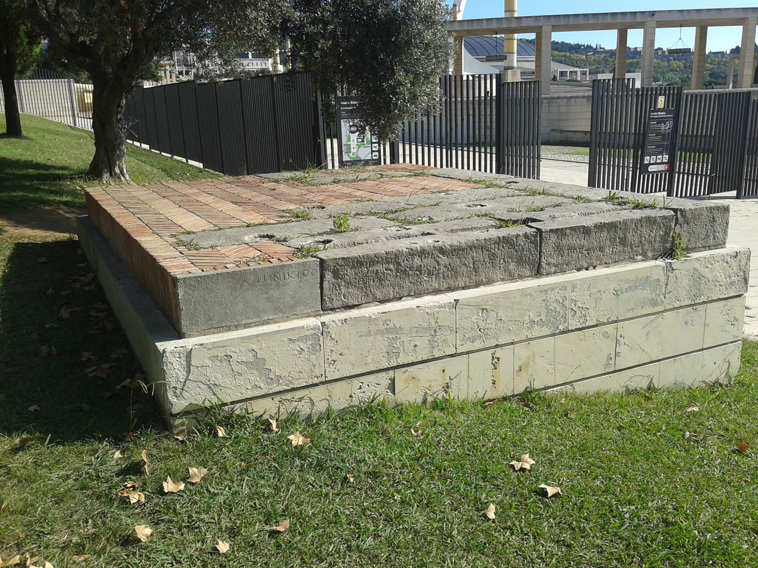 Monument a Luci Minici, guanyador dels Jocs Olímpics l'any 129 situat a l'Anella Olímpica de Barcelona.